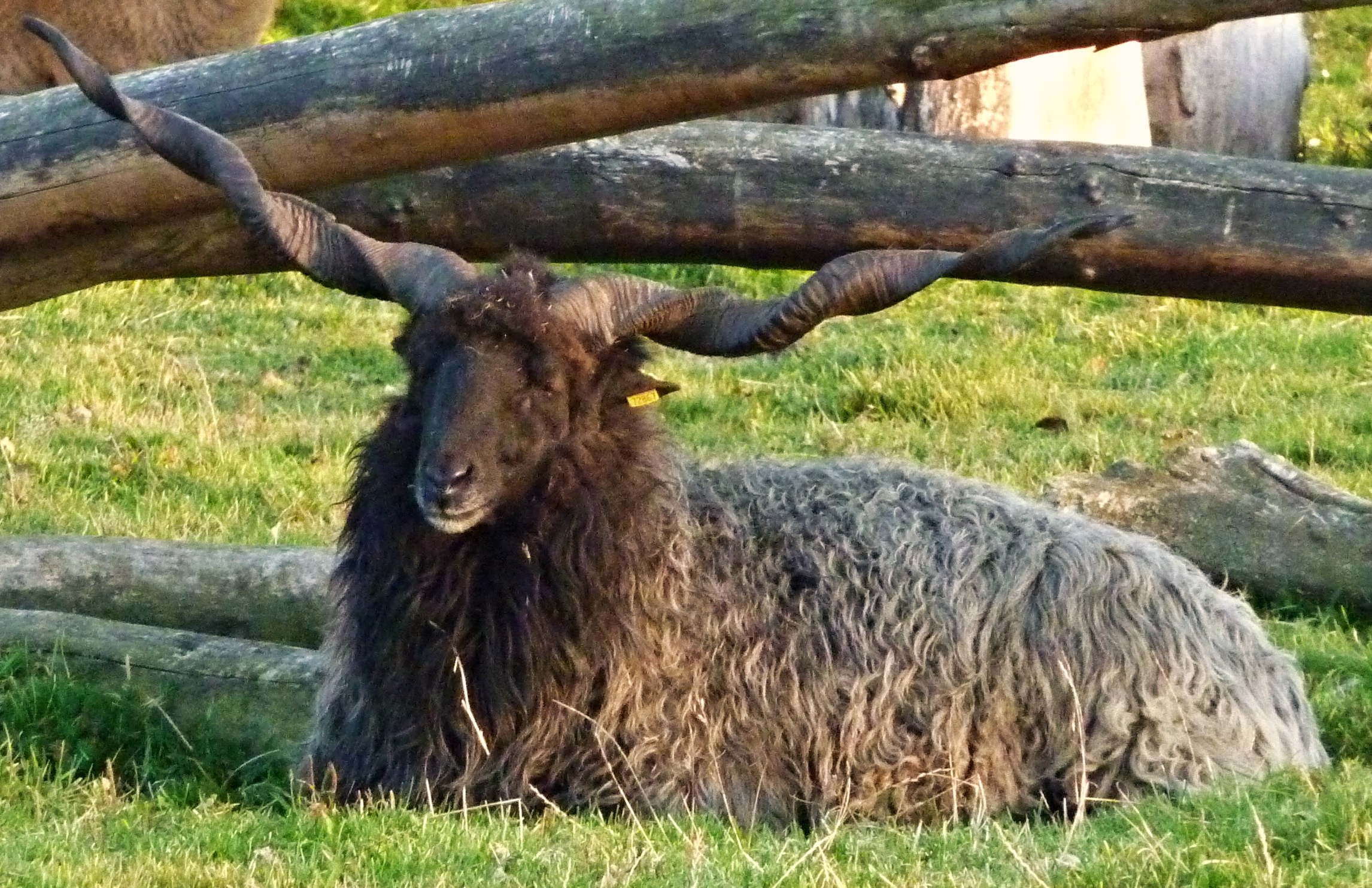 Ungarisches Zackelschaf schneiden Das Zackelschaf ist eine alte ungarische Schafrasse, die seit der Zeit der Landnahme Ende des 9. Jahrhunderts als Gefährte der Ungarn gilt. Lange Zeit war es das typische Tier der Schäfer im ungarischen Tiefland. Heute stellt es jedoch zusammen mit den anderen traditionellen Schafrassen (Cikta und Cigája) nur noch fünf Prozent des Gesamtbestands in Ungarn. Das Zackelschaf ist eine geschützte Rasse. Dieses hier lebt auf dem Freizeitpark Possen bei Sondershausen in Thüringen.